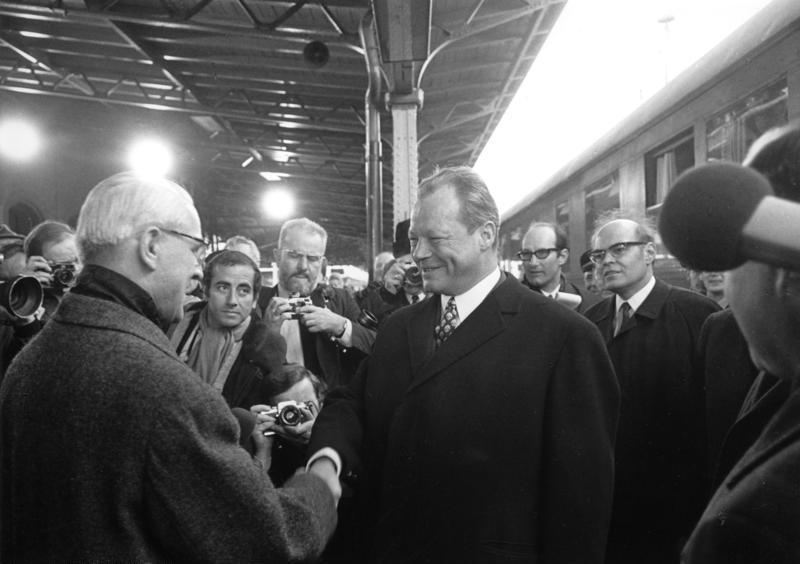 19.3.1970 Bundeskanzler Willy Brandt wird auf dem Hauptbahnhof in Erfurt von dem Vorsitzenden des Ministerrates der DDR, Willi Stoph, begrüßt.